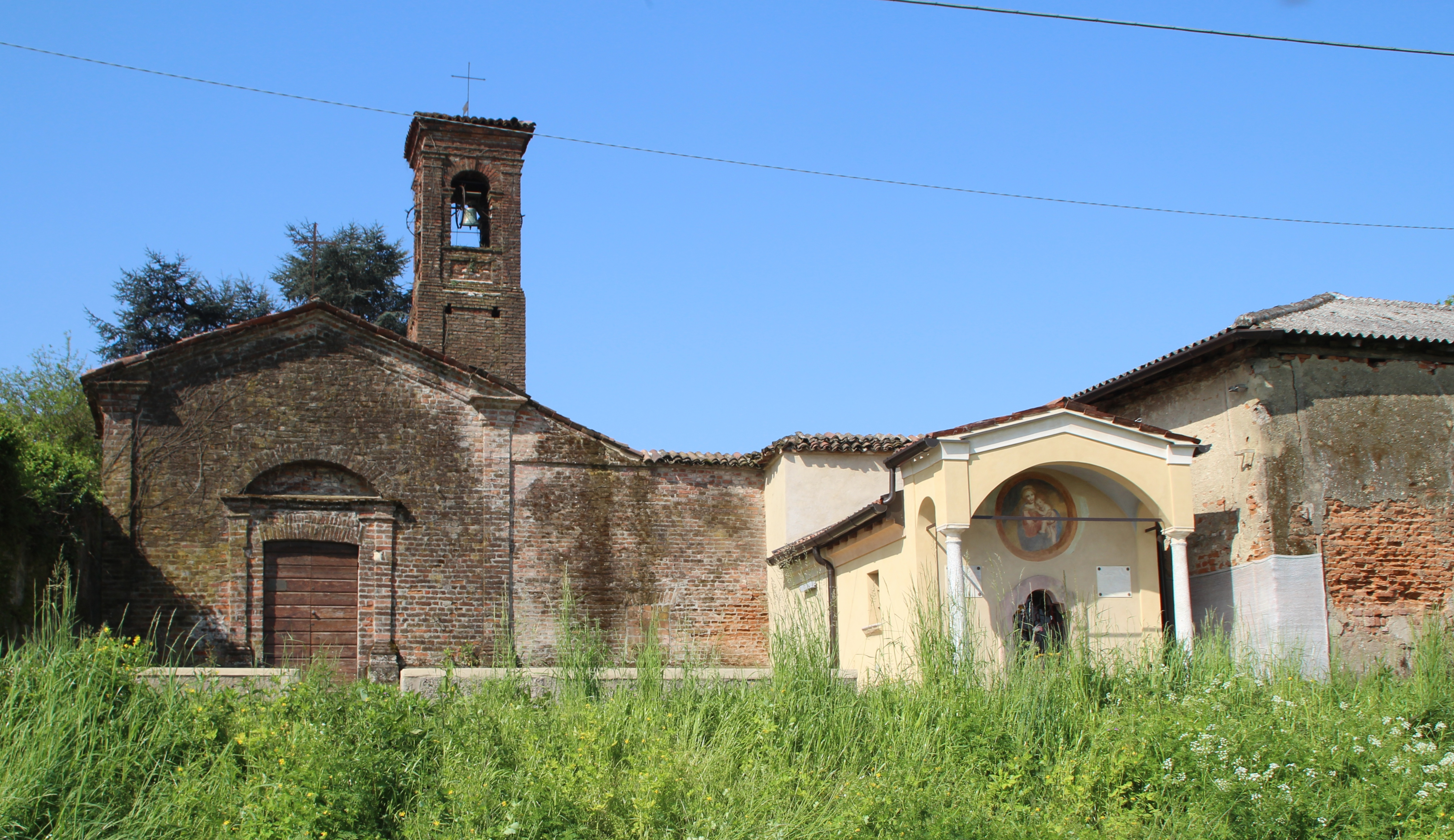 Ossario Santa Maria della Neve Beinhaus bei Mezzano